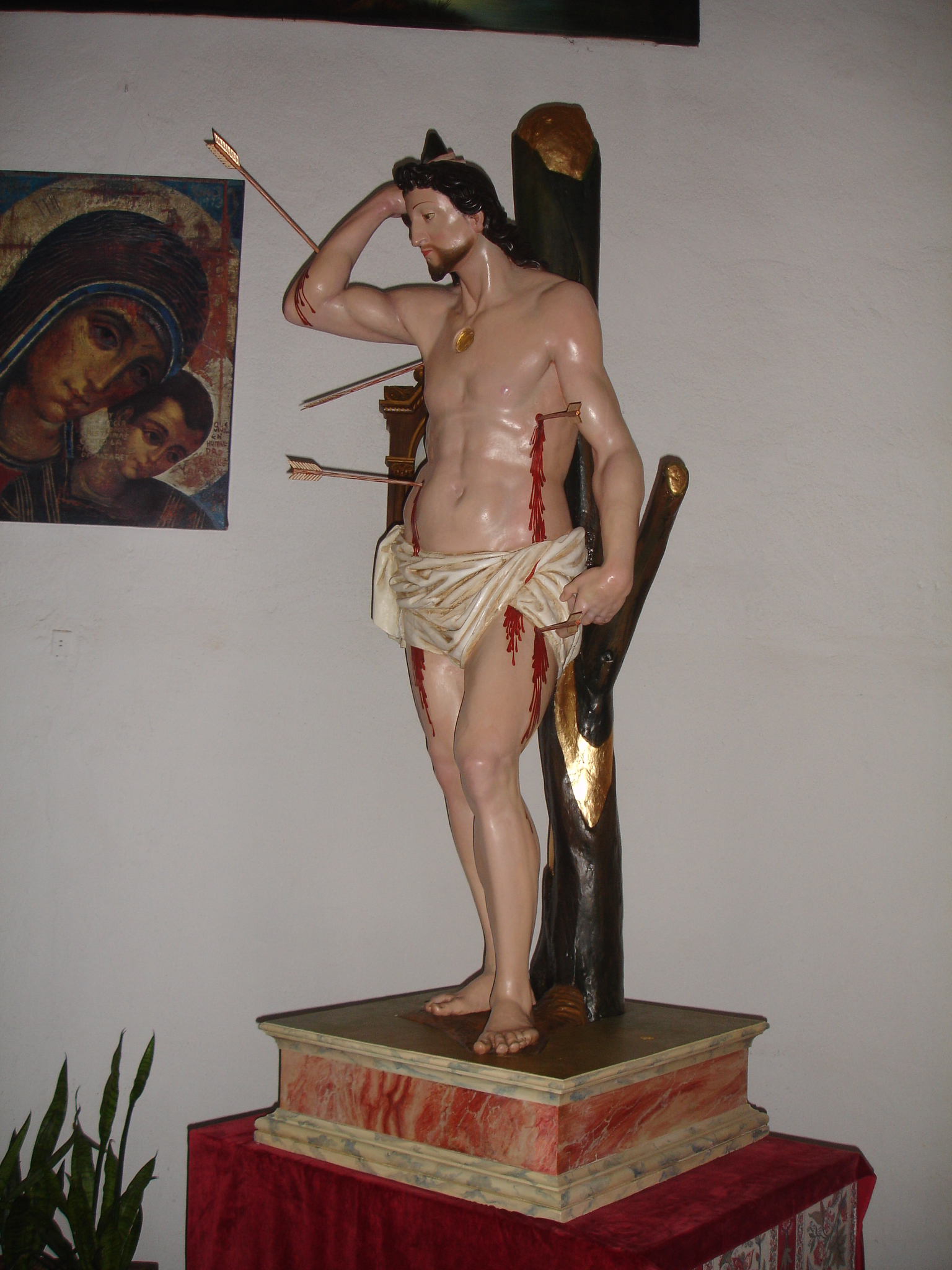 Escultura de San Sebastián en Sanlúcar de Barrameda, 1650.